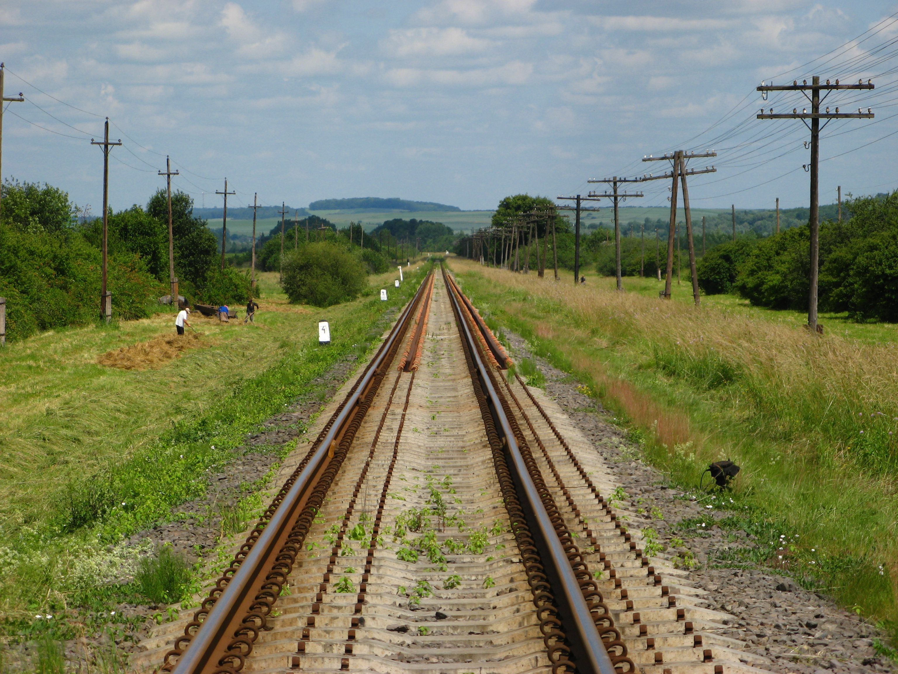 Перша угорсько-галицька залізниця. Біля села Нове Місто (Старосамбірський р-н, Львівська обл.)